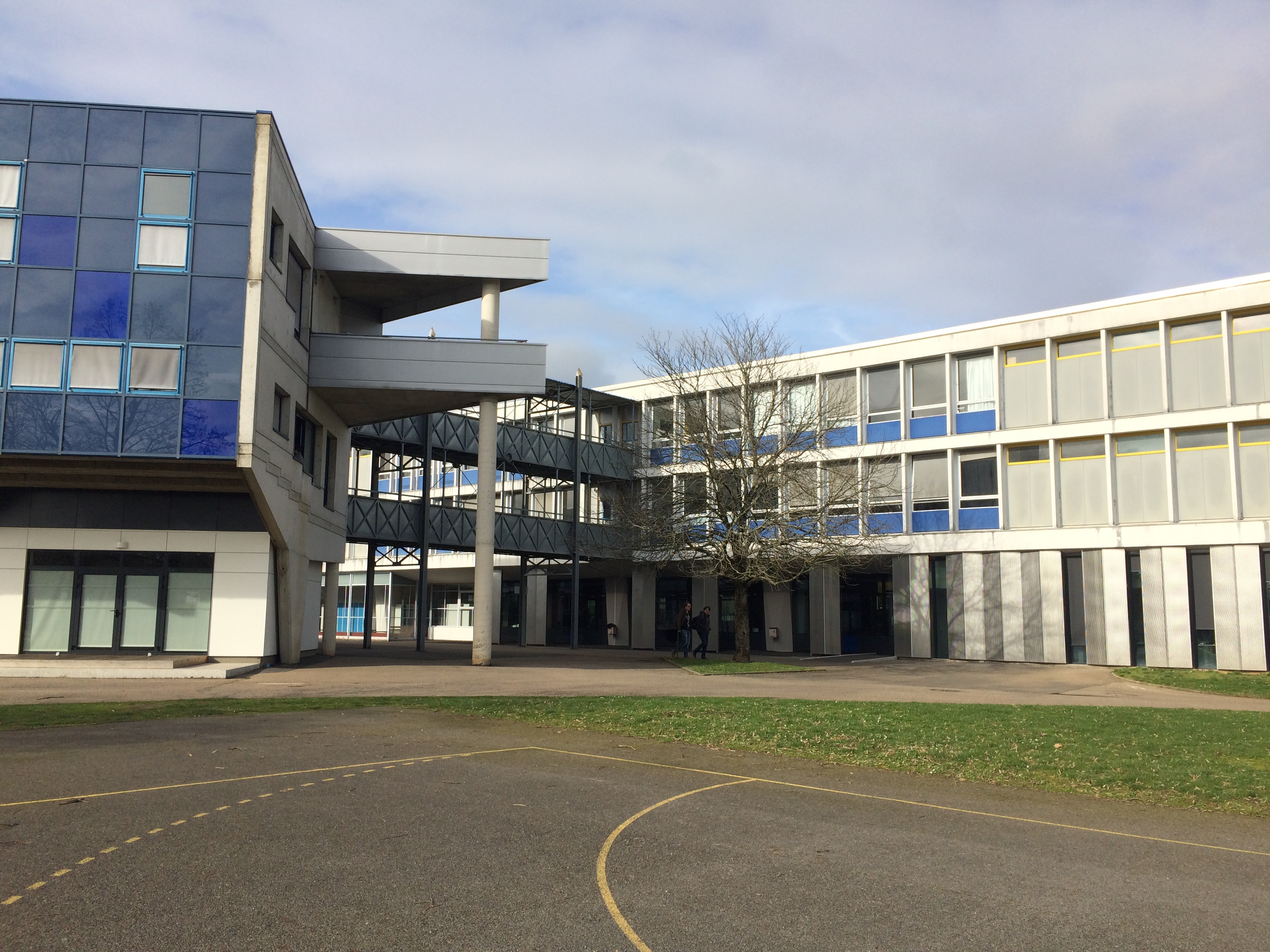 Une vue du bâtiment prépa ainsi que d'une partie du bâtiment principal